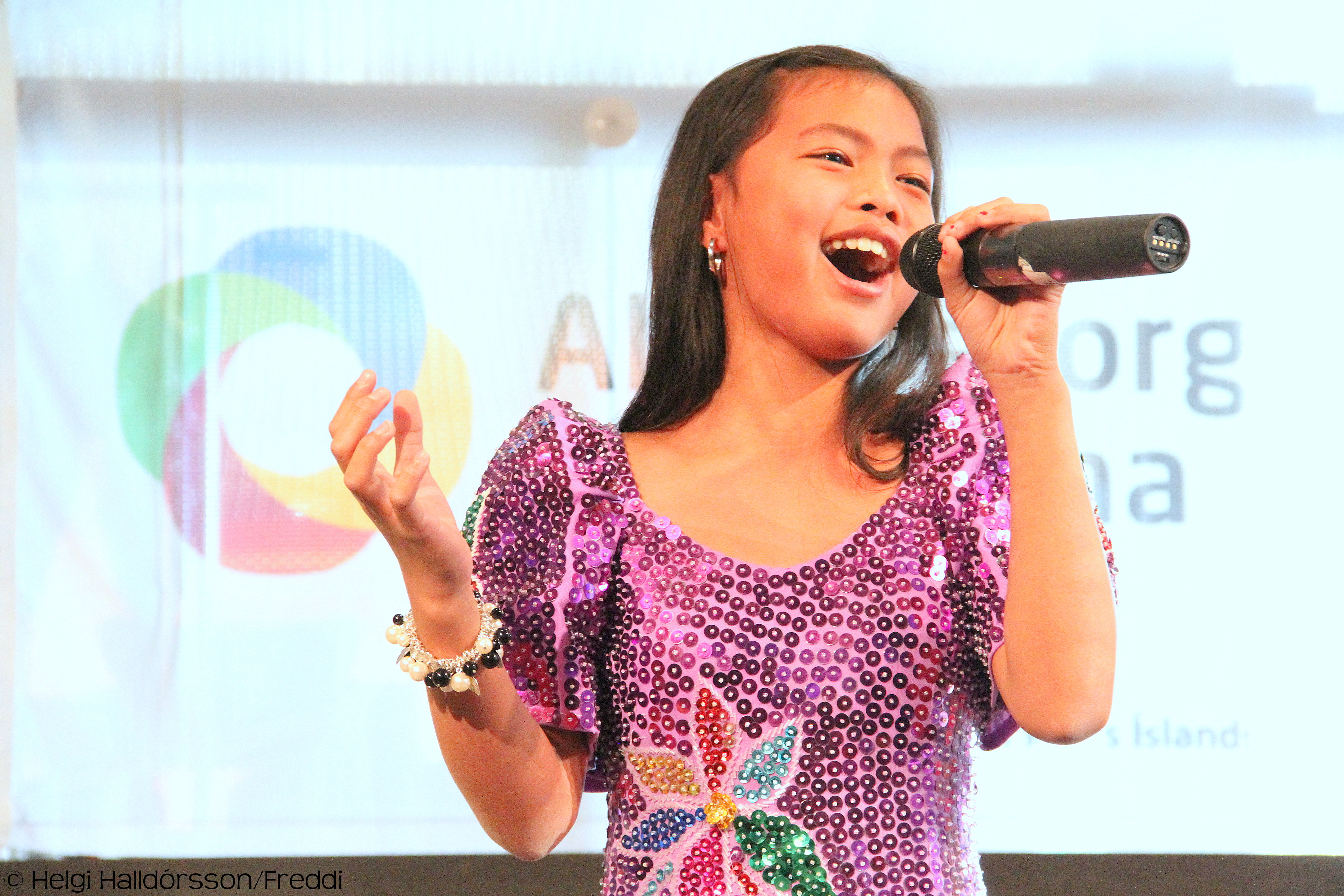 An Icelandic girl singing